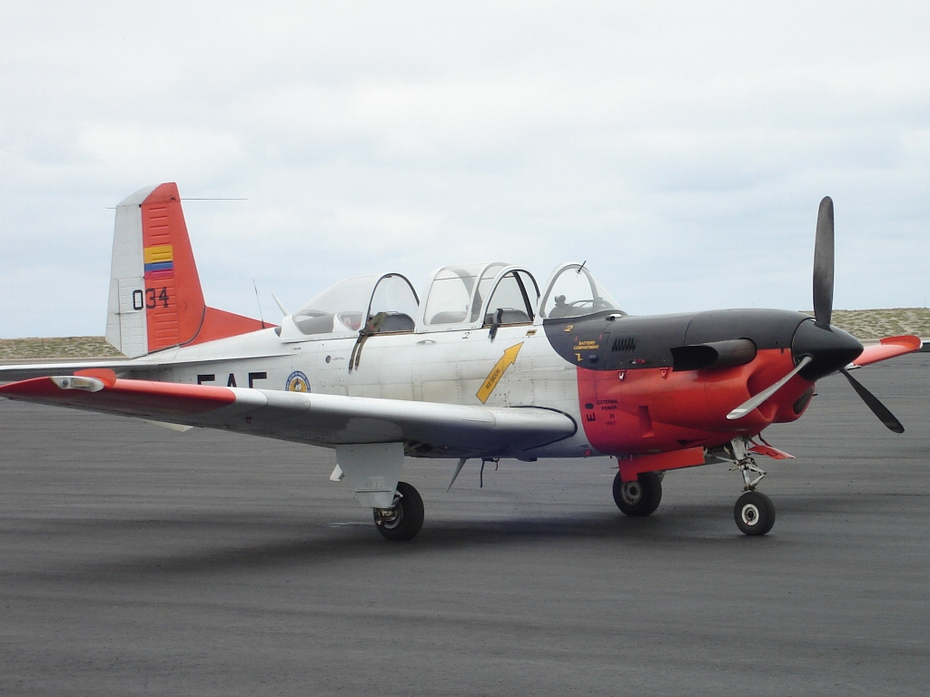 T34C1